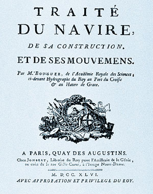 Pierre Bouguer, Traité du Navire. 18e eeuw